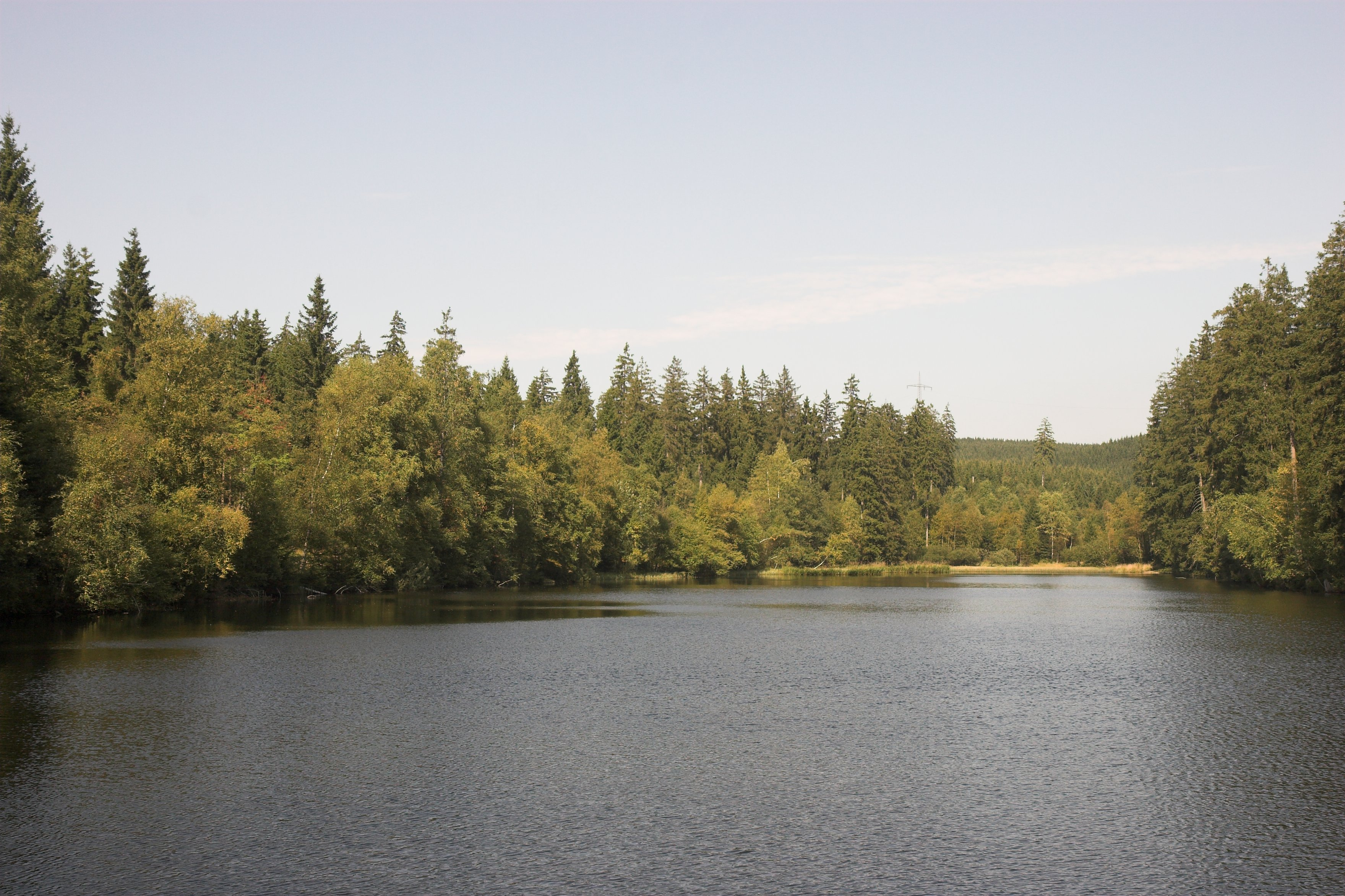 Der Silberteich bei Braunlage